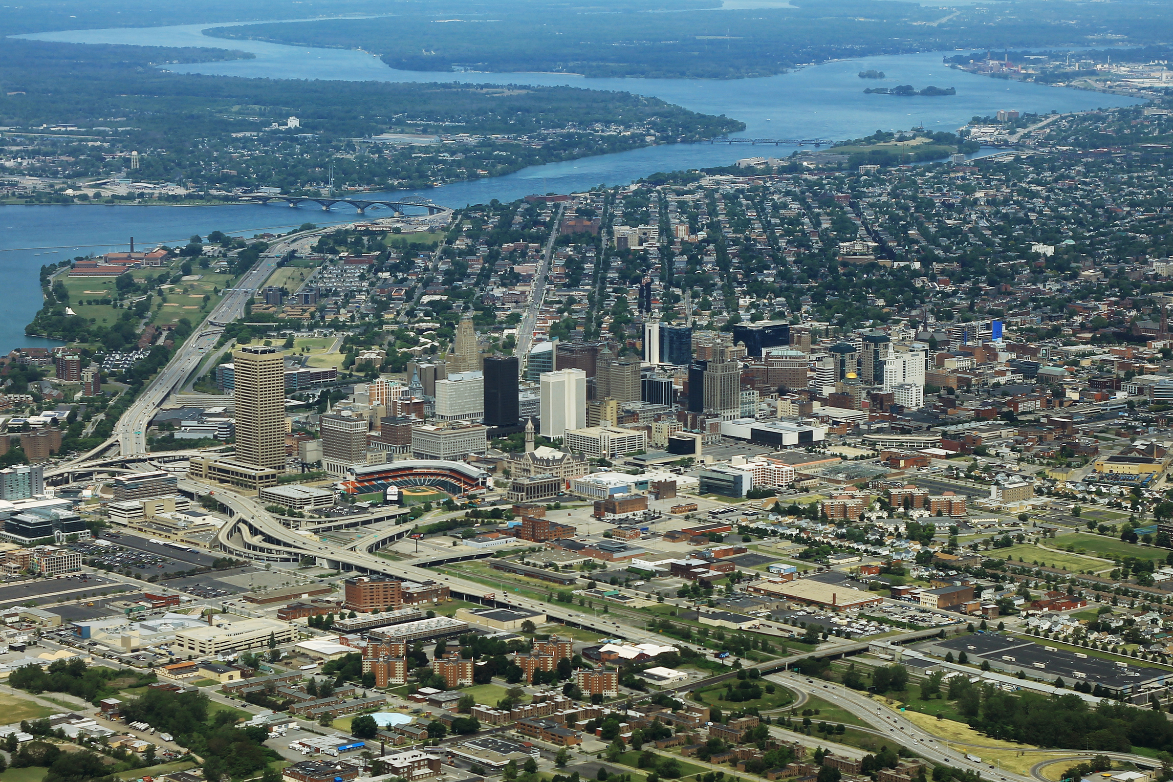 Buffalo Skyline - June 2018